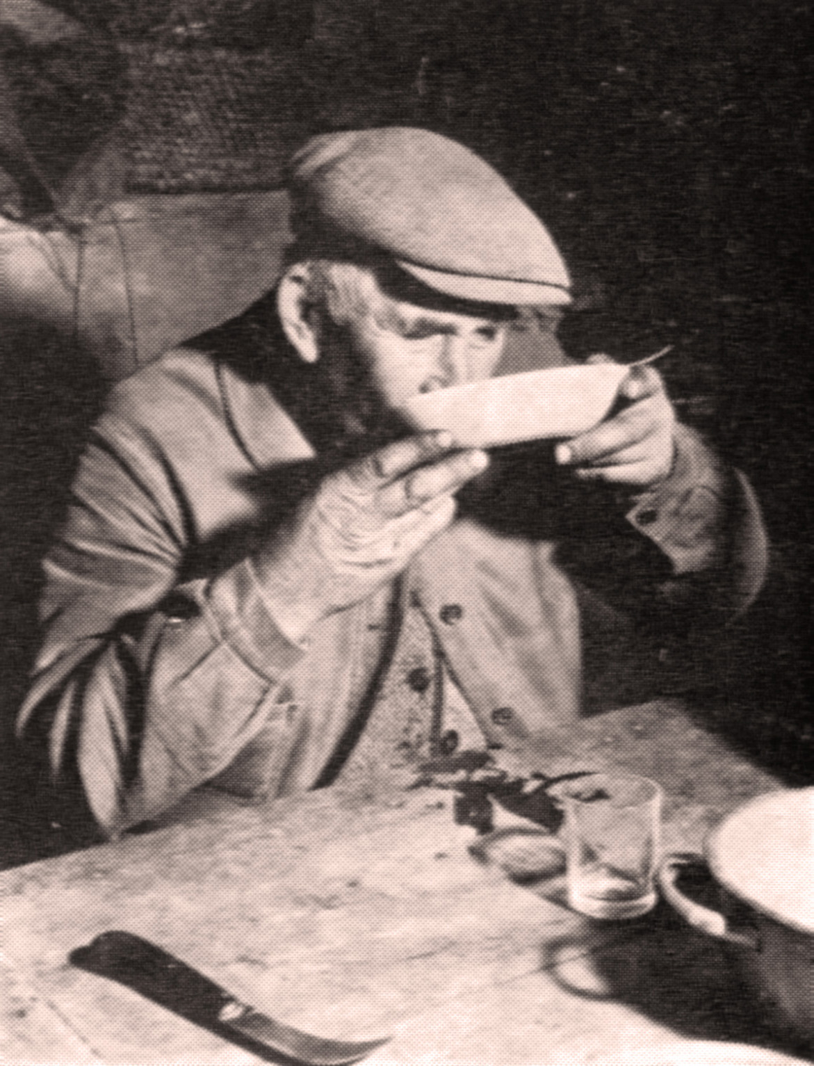 Vigneron faisant chabrot